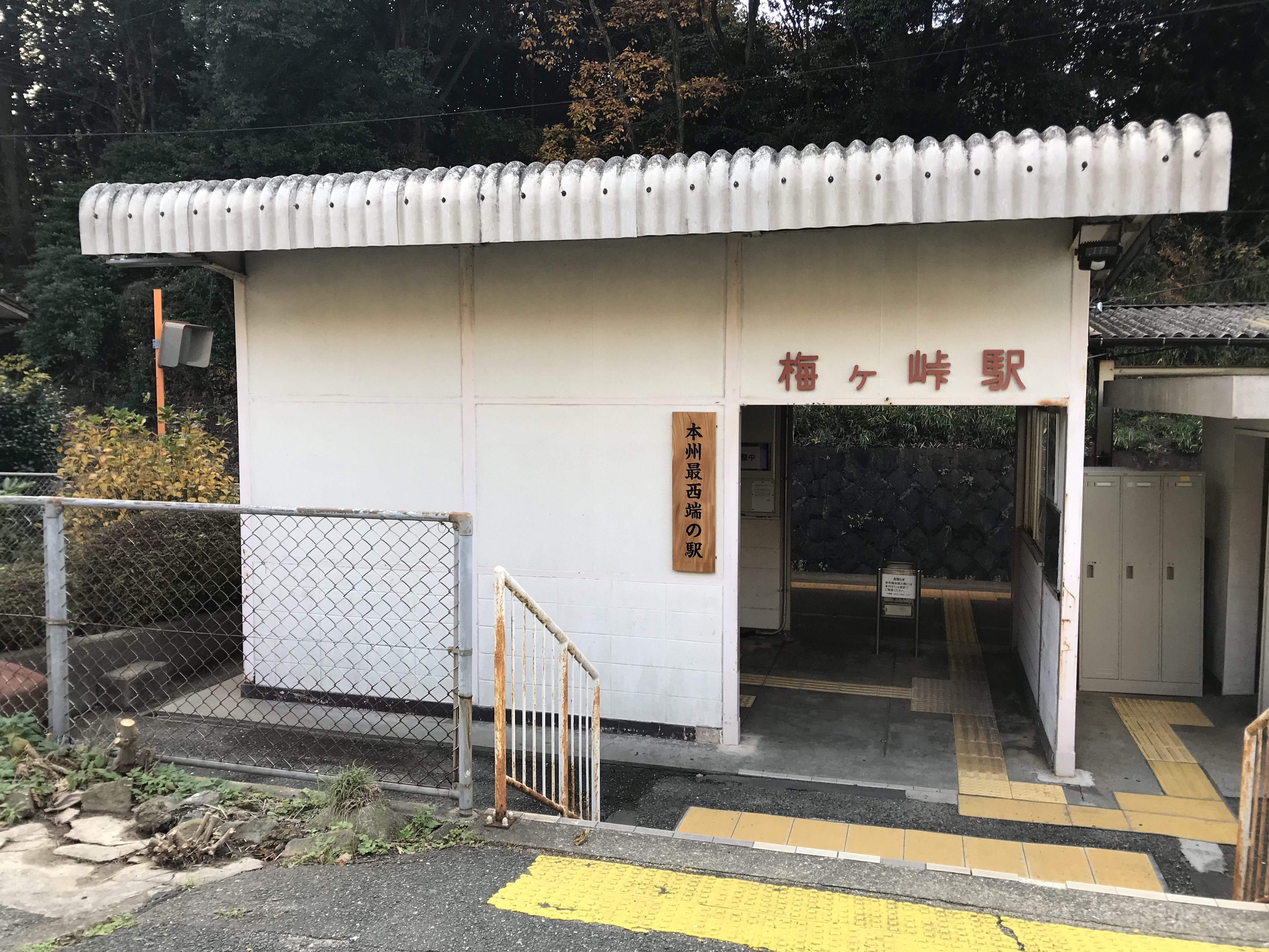 梅ヶ峠駅の駅舎